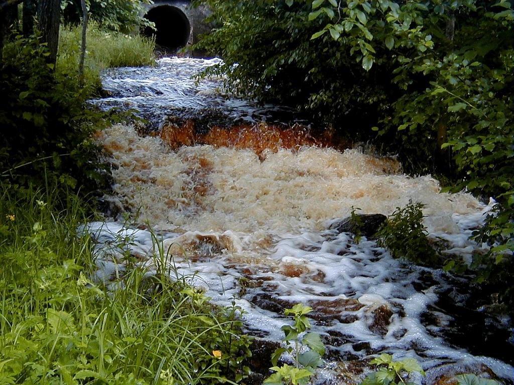 Veģupītes ūdenskritums Veģos 2001-07-21